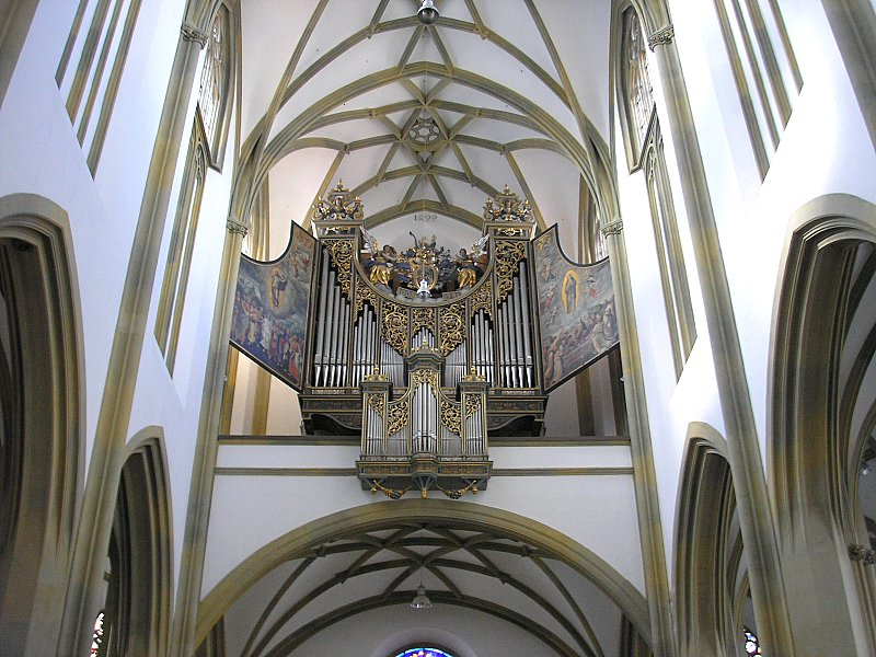 Ehemalige Benediktinerstiftskirche St. Ulrich und Afra (Augsburg, Bayerisch-Schwaben). Langhaus, Rückblick zur Orgelempore. Eigene Aufnahme, März 2007 / Former Benedictine monastery church St. Ulrich and Afra (Augsburg, Bavaria, Germany). Interior, looking west to the organ. Own photo, March 2007